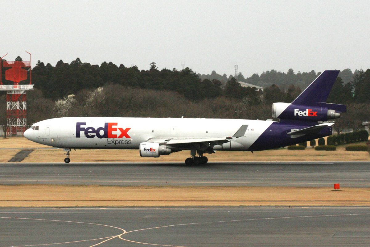 FedEx MD-11F(N526FE)